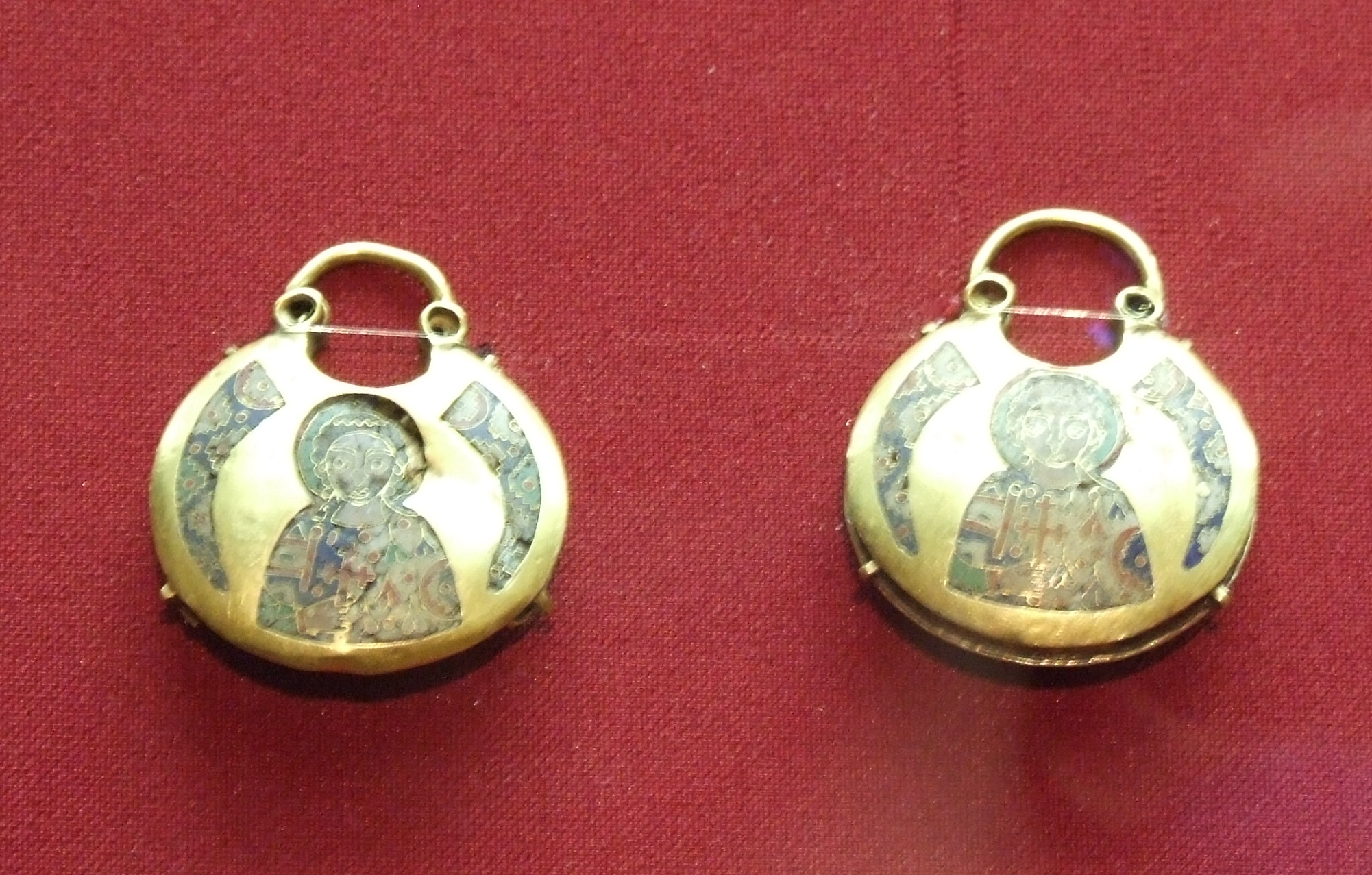 Список экспонатов КОЛТЫ XII век Киев Золото; перегородчатая эмаль 4,4 х 3,6 х 1,2; 4,4 х 3,6 х 0,5 Поступили в 1888 году из Императорской Археологической комиссии Происходят из клада, найденного в 1887 году в Чернигове, в районе Александровской площади ГЭ инв. 1021/9; 1021/10